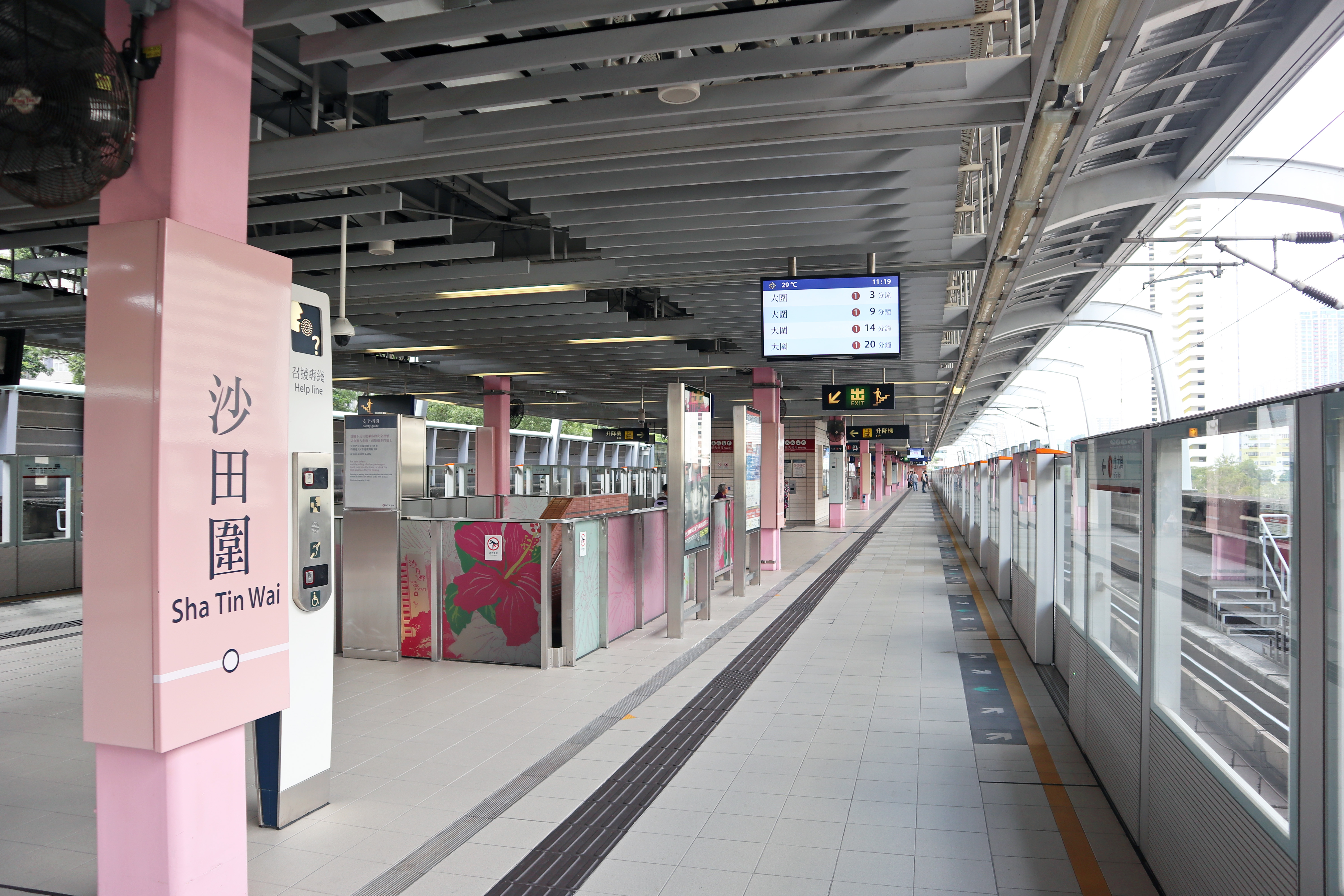 港鐵沙田圍站月台